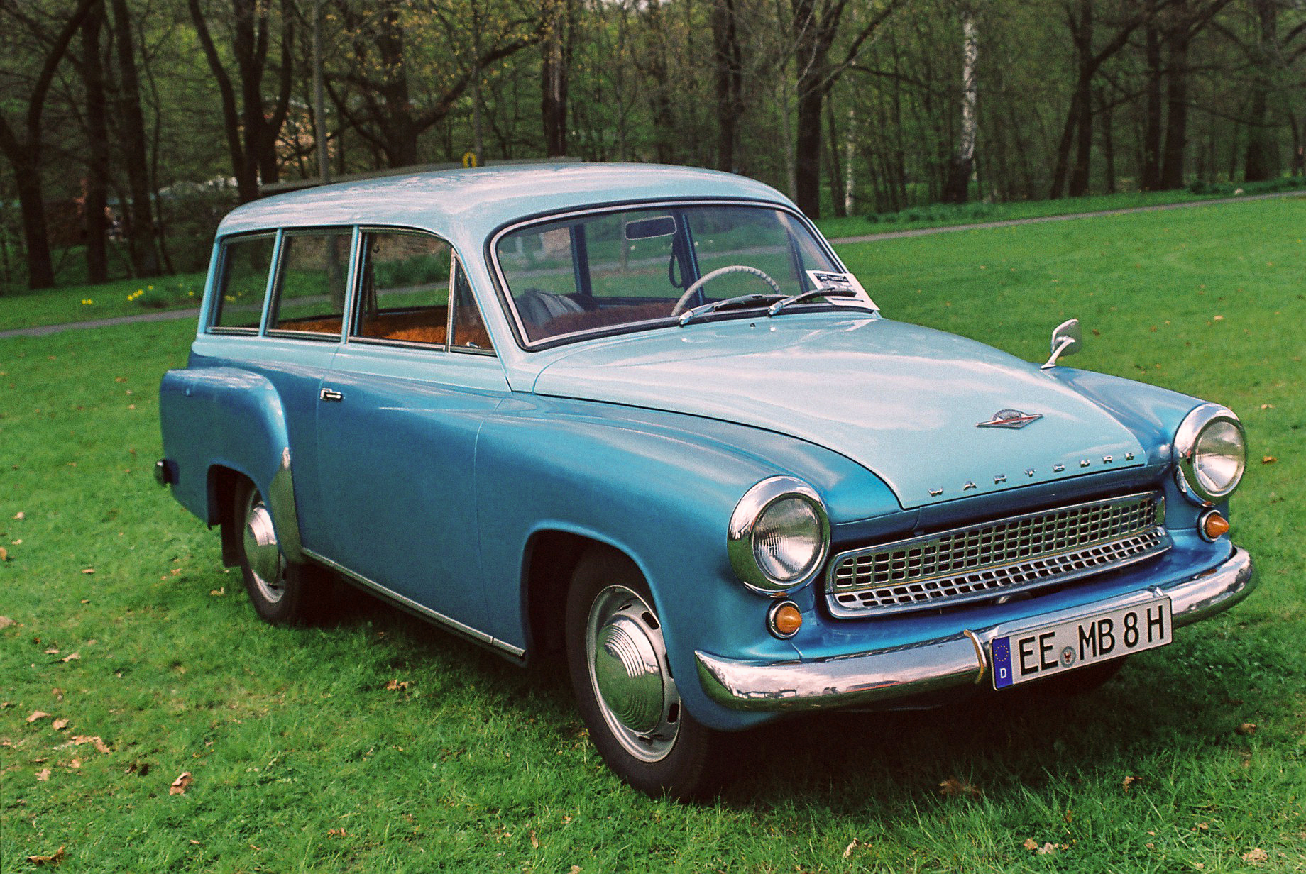 historischer Wartburg beim Oldtimertreffen im Familiengarten Eberswalde